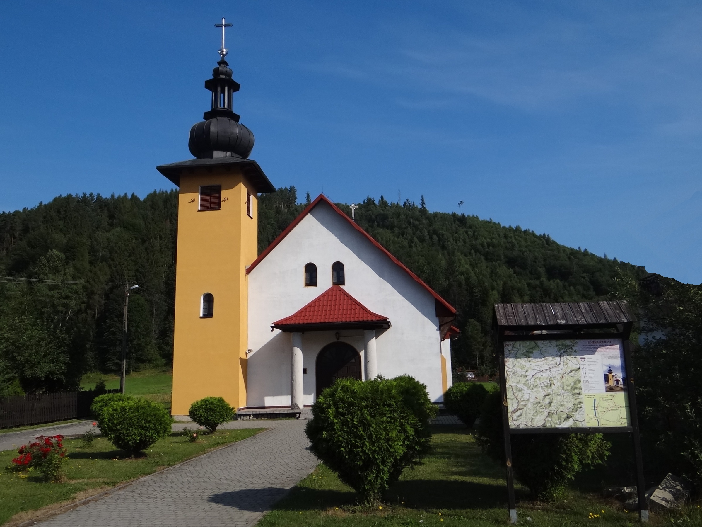 Kościół w miejscowości Rycerka Dolna